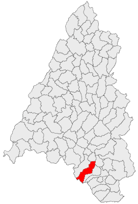 Categorie:Hărţi ale judeţului Bihor